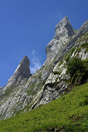 Hundstein (rechts) und Rot Turm